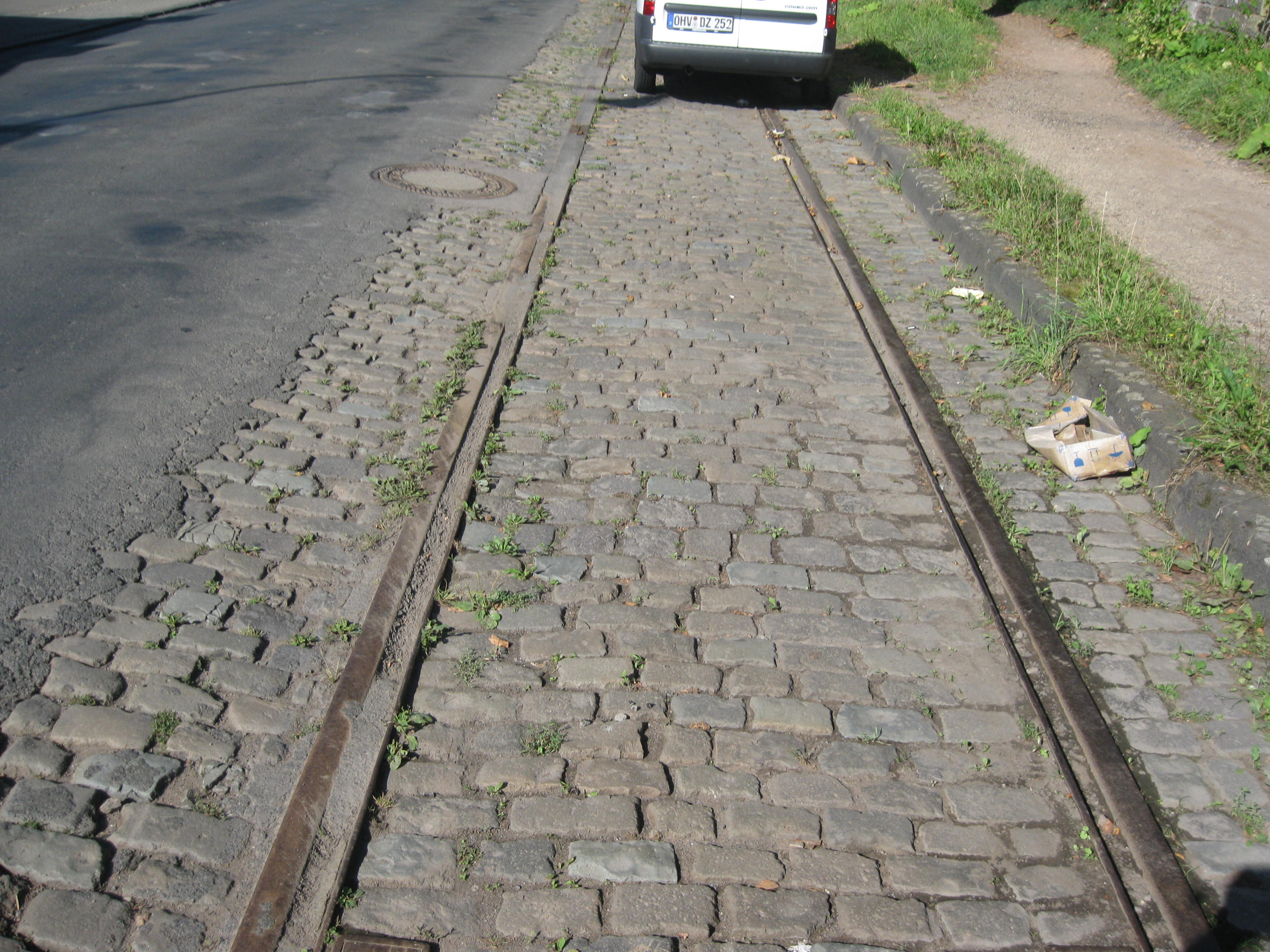 Rest der Moselbahn, Kürenzer Straße, Trier